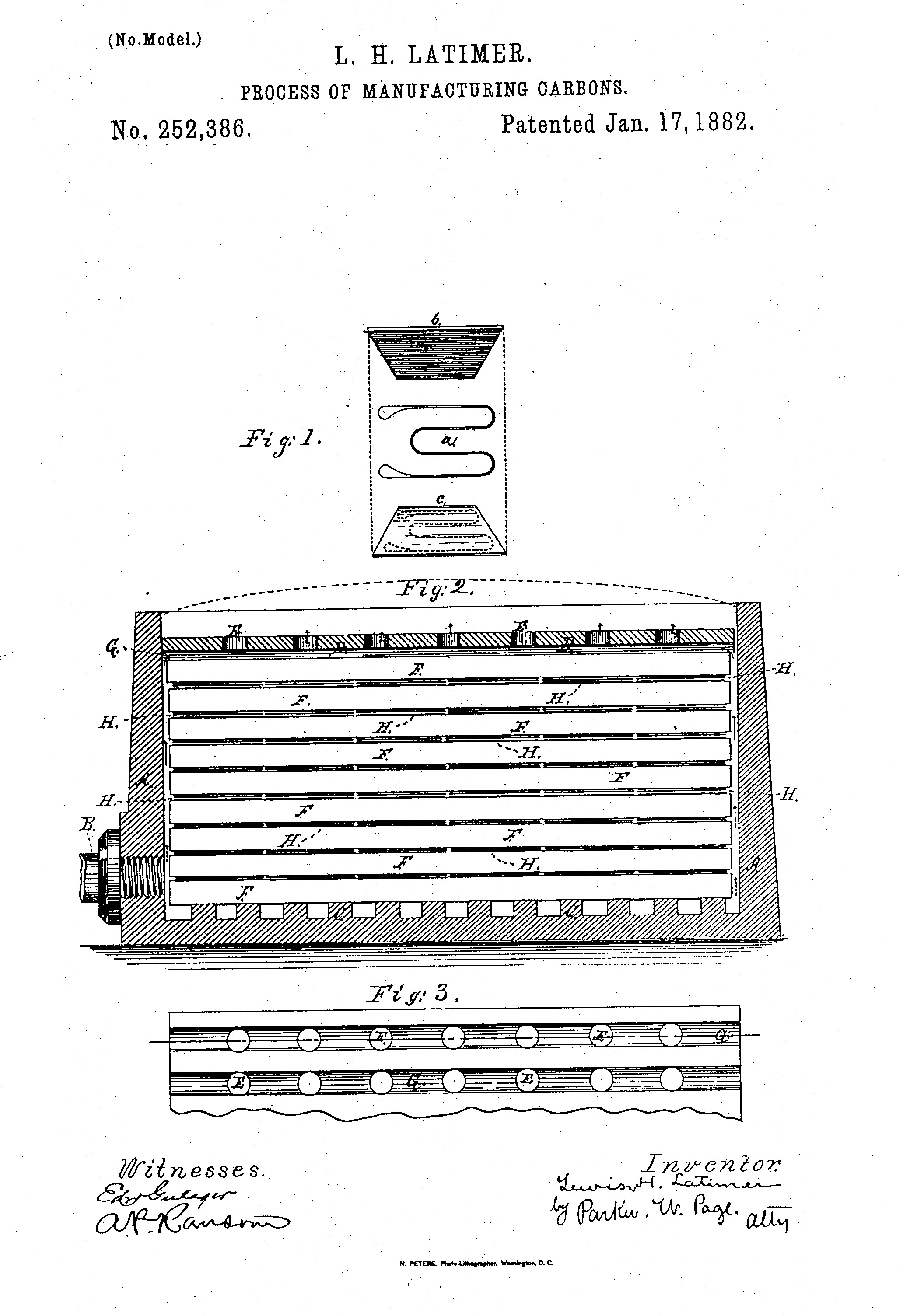 Erste Seite (Zeichnung) des US-Patents 253.386 "Process of manufacturing Carbons" von Lewis H. Latimer